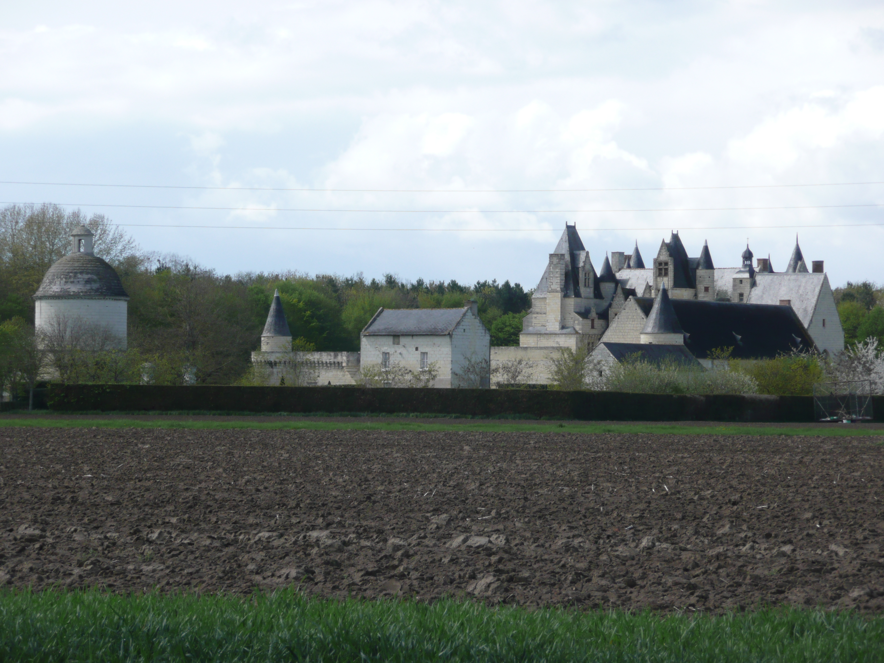 Chateau de Boumois